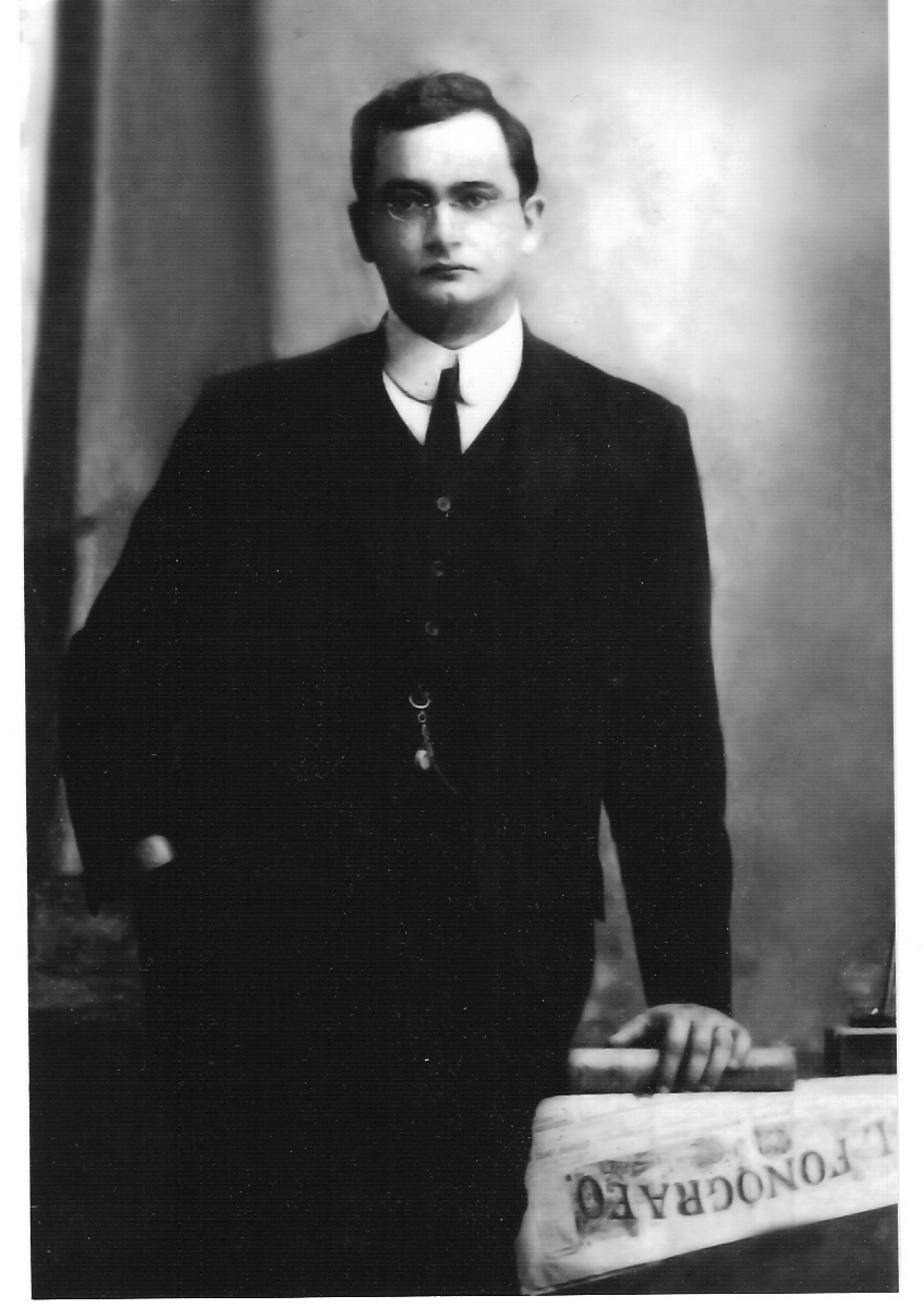 Eduardo López Bustamante en 1908. Fotografía tomada en las oficinas del Diario El Fonógrafo de la ciudad de Maracaibo, Venezuela.